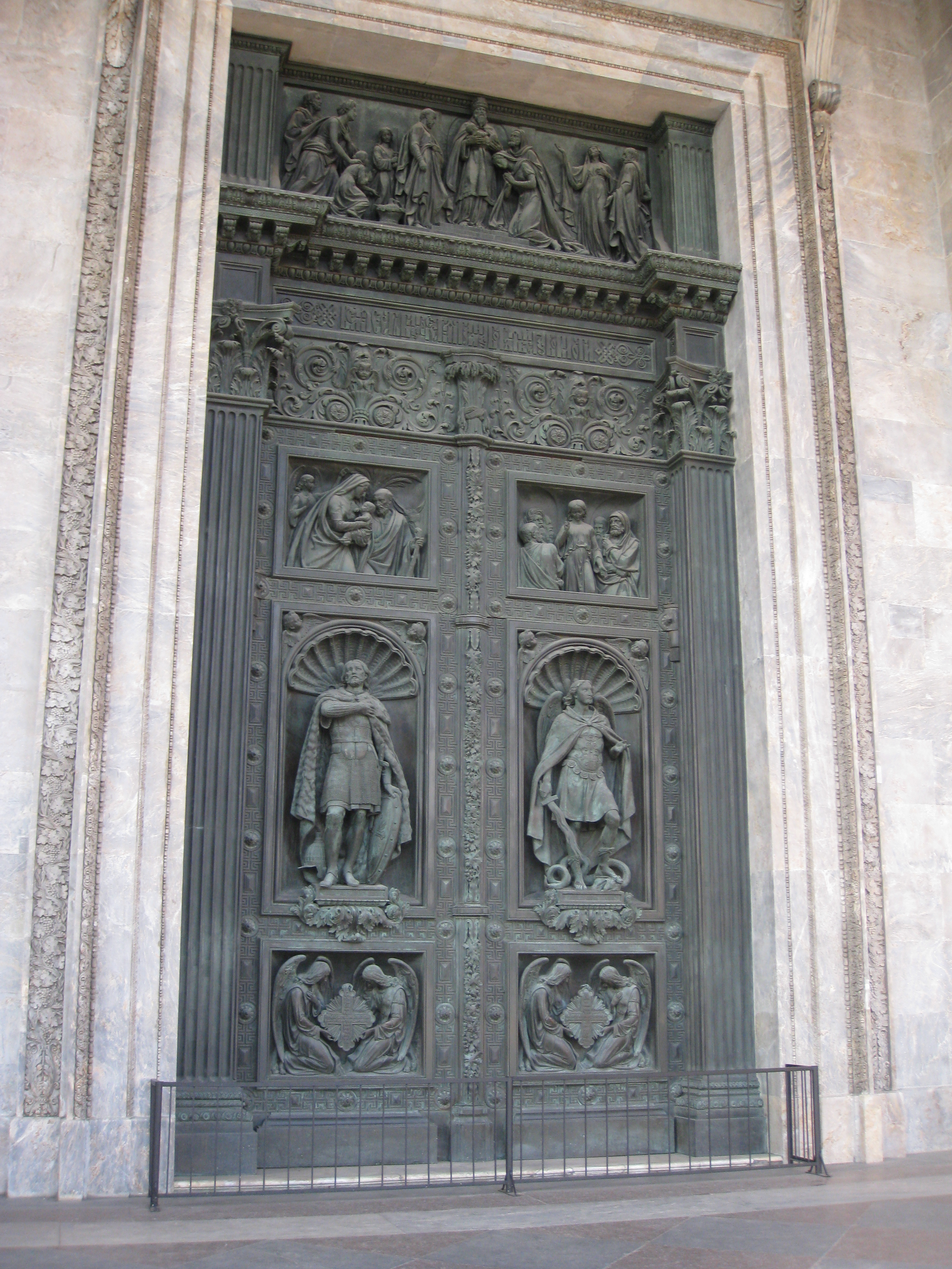 Saint Isaac's Cathedral קתדרלת יצחק הקדוש